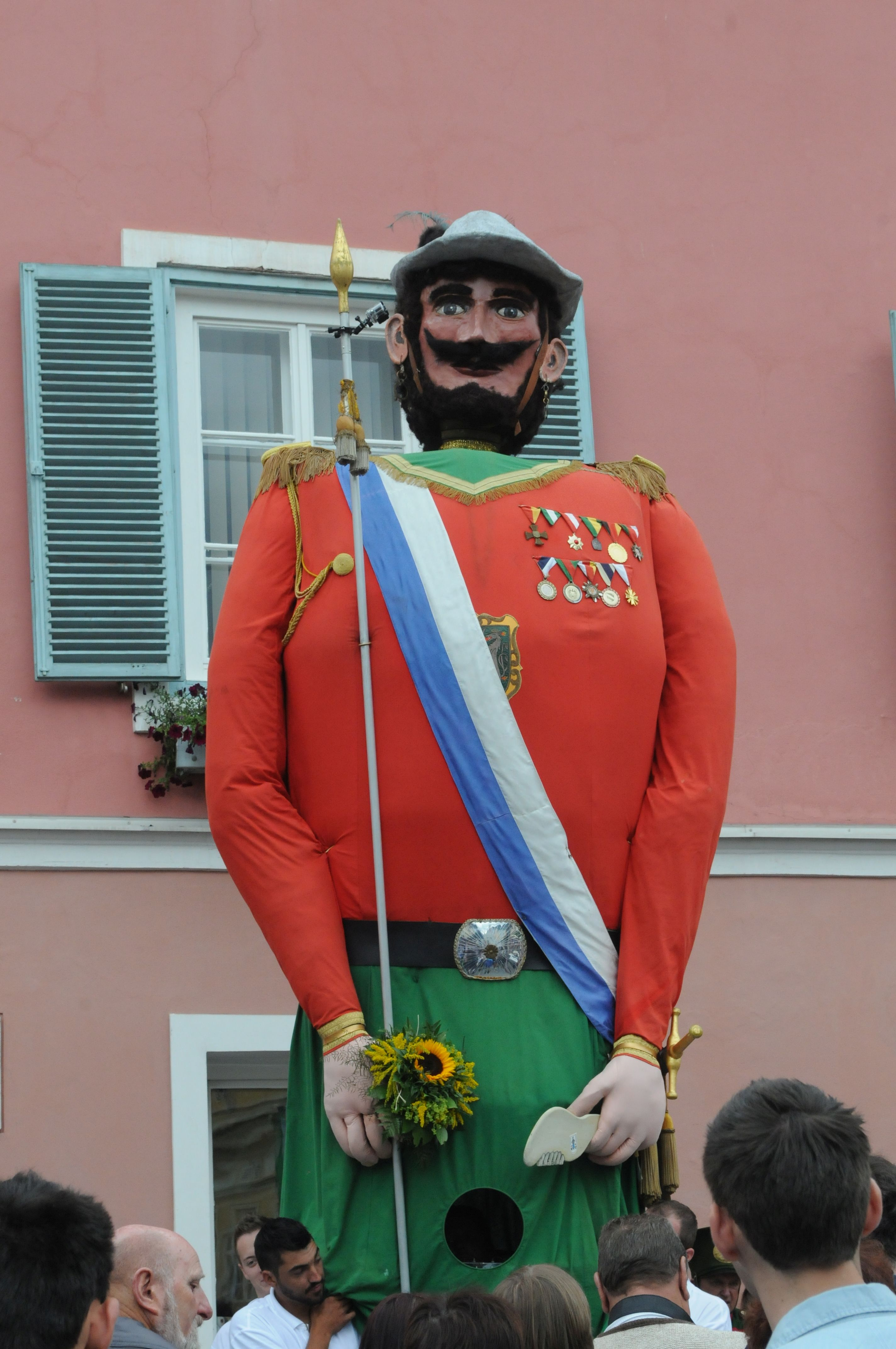 Samson II, Stadtkapelle Murau und Bürgergarde beim Samsonuzug am 15.August 2014